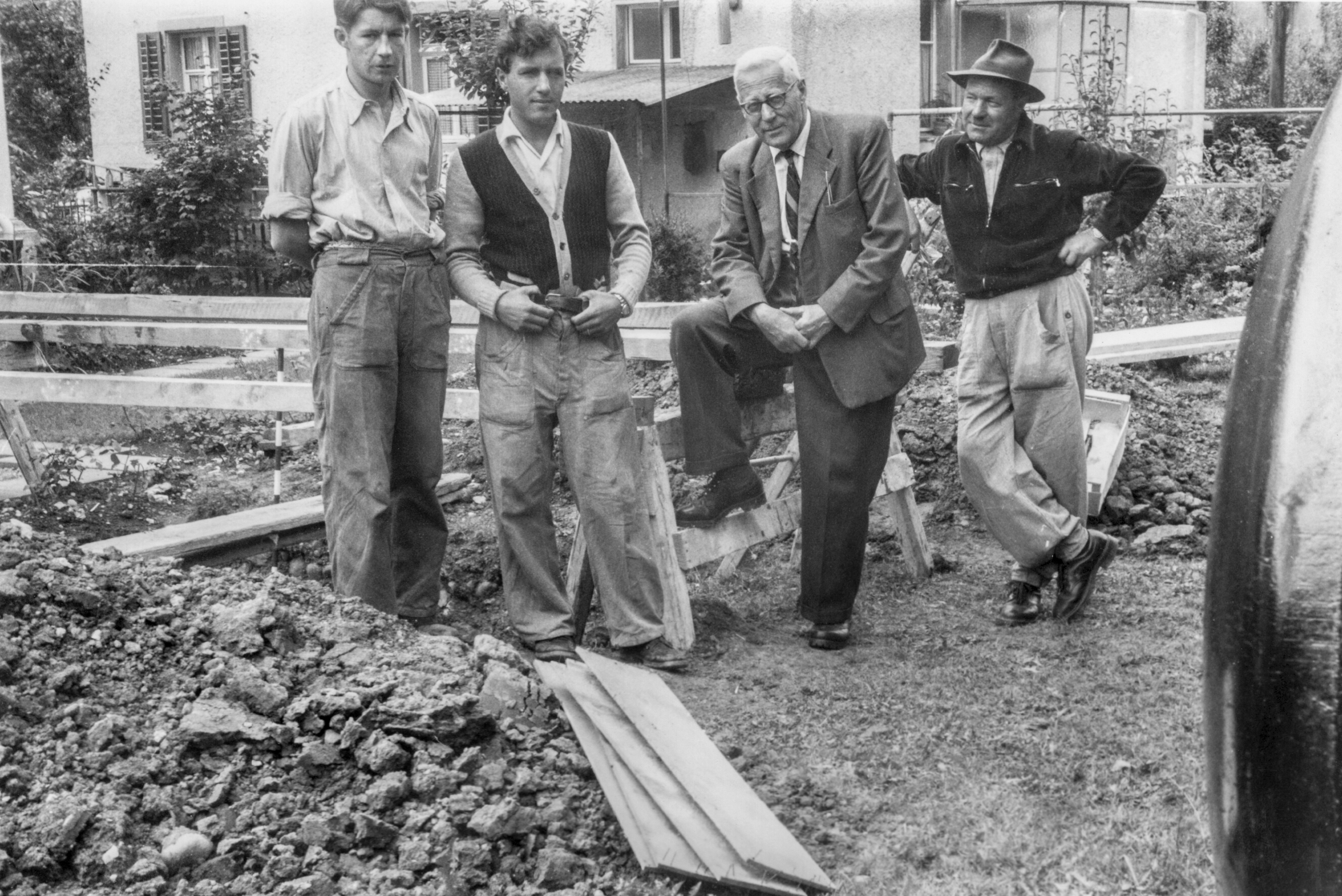 Bildarchiv der Kantonsarchäologie Aargau Kürzel/FotoNr.: Wet.56.1.6 Archiv Nr. Col./Dig.: 88725 Objekt: Neolithisches Steinkistengrab mit Hockerbestattung Lage: Wettingen, Schartenstr. 77 Aufnahmedatum: 1956 Zeitgenössische Beschriftung: "Wettingen. Von l. nach r.: Hr. Moll, stud.phil.; Hr. Hürbin jun.; Dr. Bosch; Hr. K. Hürbin sen." Ausgrabung: Beim Aushub für einen Öltank stieß man am 24. Juli 1956 in einer Tiefe von ca. 100 cm unter der Erdoberfläche auf ein ost/südost-west/nordwest orientiertes Steinkistengrab. Datierung des Befundes: Neolithisch Literatur: - JbSGU 47, 1958-59, S. 155 - Argovia 70, 1958, S. 238